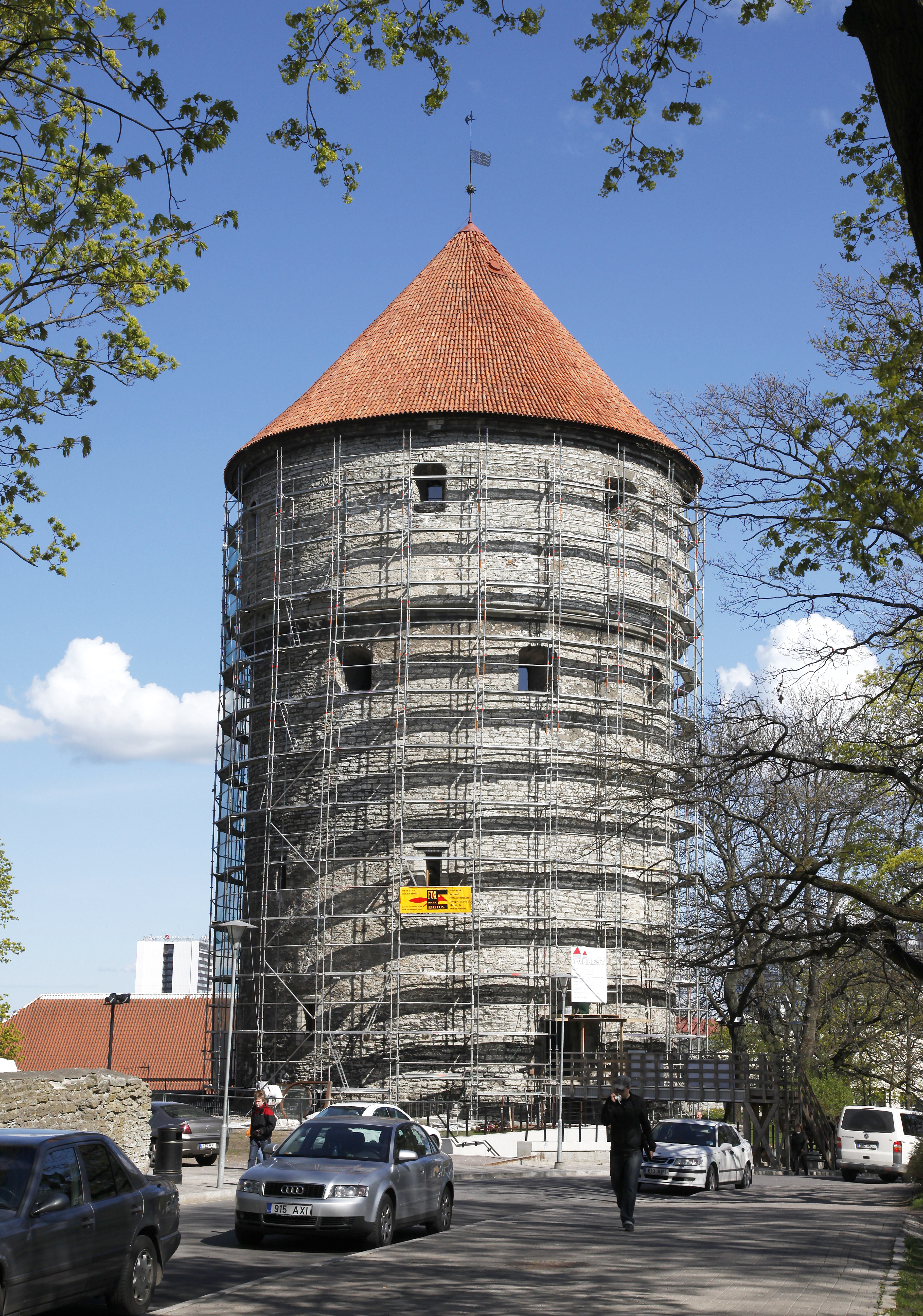 Kiek in de Kök tellingutes mai 2009